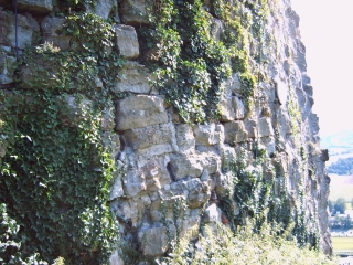 Aussergewöhnlich große und grob bearbeitete Steine in der sogenannten Schildmauer auf Burg Hornberg